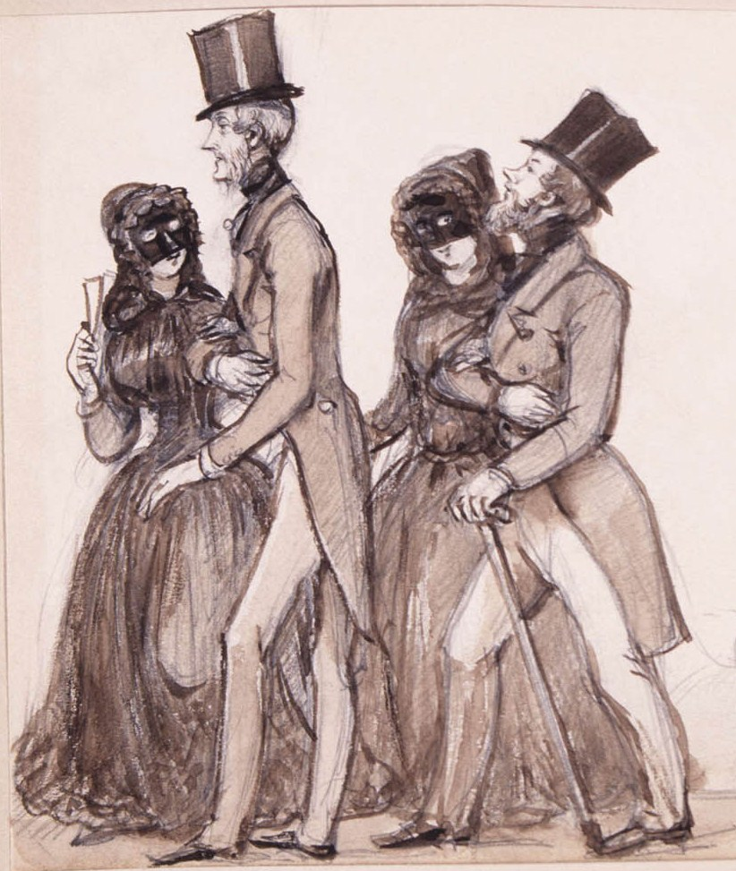 "Människor på väg till en maskerad" : "Les gens qui vont à une mascarade", représentés par Fritz von Dardel, Paris 1842.